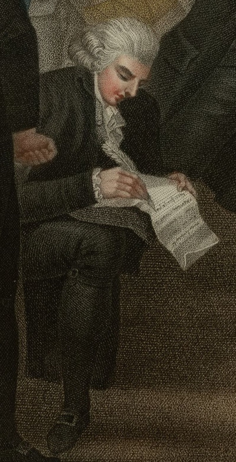 Détail de la gravure dépeignant Jacques Roux en train de rédiger le compte rendu de l'exécution de Louis XVI.